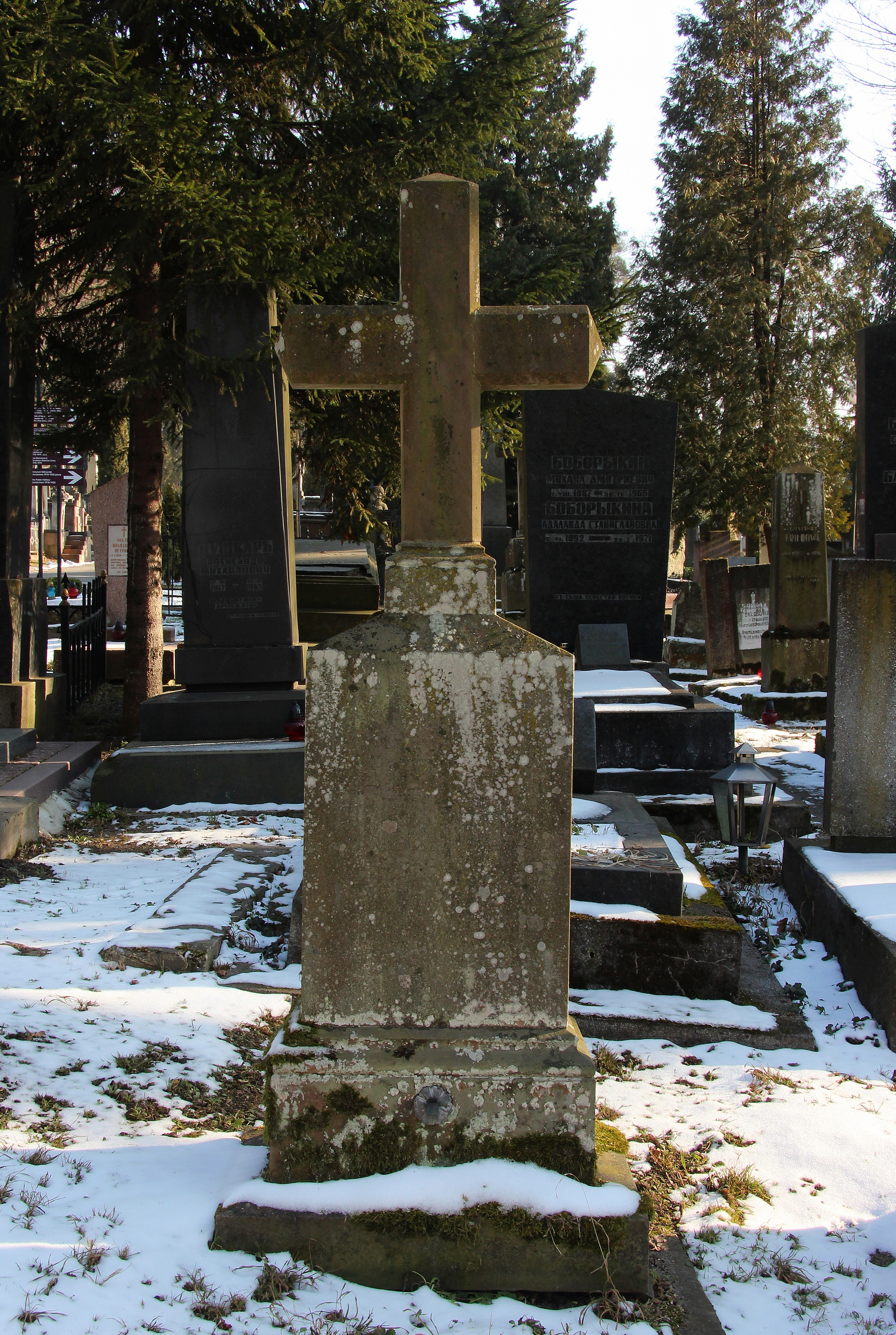 Пам'ятник на могилі арх. Альбіна Загурського.Личаківський цвинтар , поле № 53.